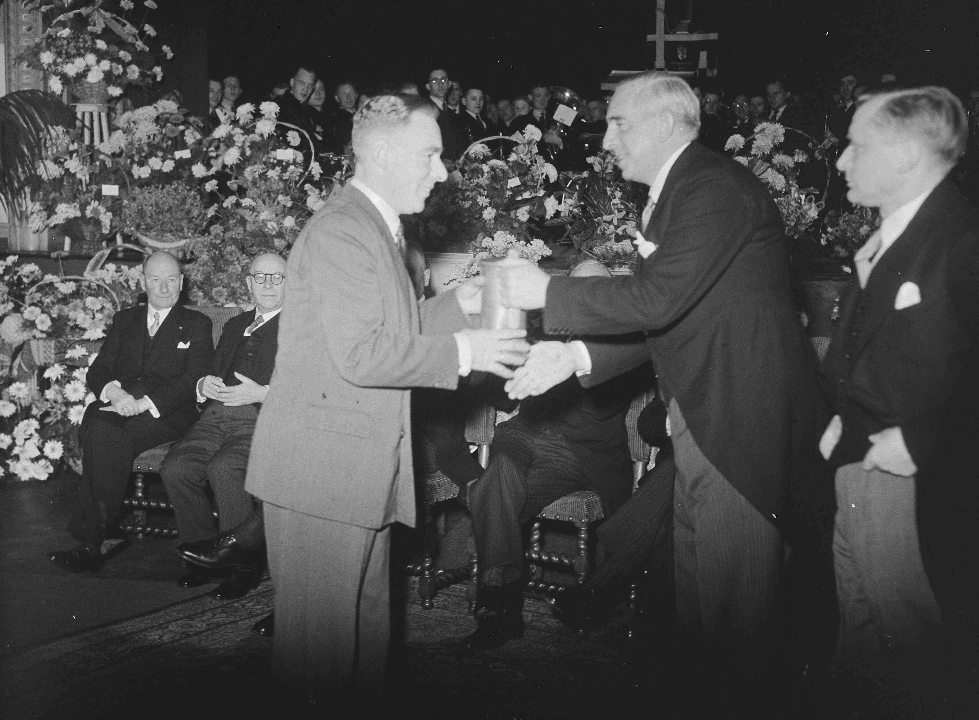 Collectie / Archief : Fotocollectie Anefo Reportage / Serie : [ onbekend ] Beschrijving : Brocades 150 jaar Receptie in Meppel Datum : 29 november 1950 Locatie : Meppel Trefwoorden : RECEPTIES Persoonsnaam : BROCADES Fotograaf : Oorschot, […] van / Anefo Auteursrechthebbende : Nationaal Archief Materiaalsoort : Glasnegatief Nummer archiefinventaris : bekijk toegang 2.24.01.09 Bestanddeelnummer : 904-3168